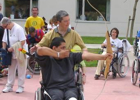 club esportiu guttmann